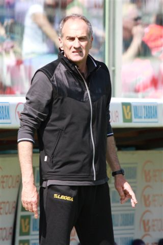 Francesco Guidolin (Castelfranco Veneto, 3 ottobre 1955) è un allenatore di calcio ed ex calciatore italiano, di ruolo centrocampista centrale o di fascia, attuale tecnico dell'Udinese.